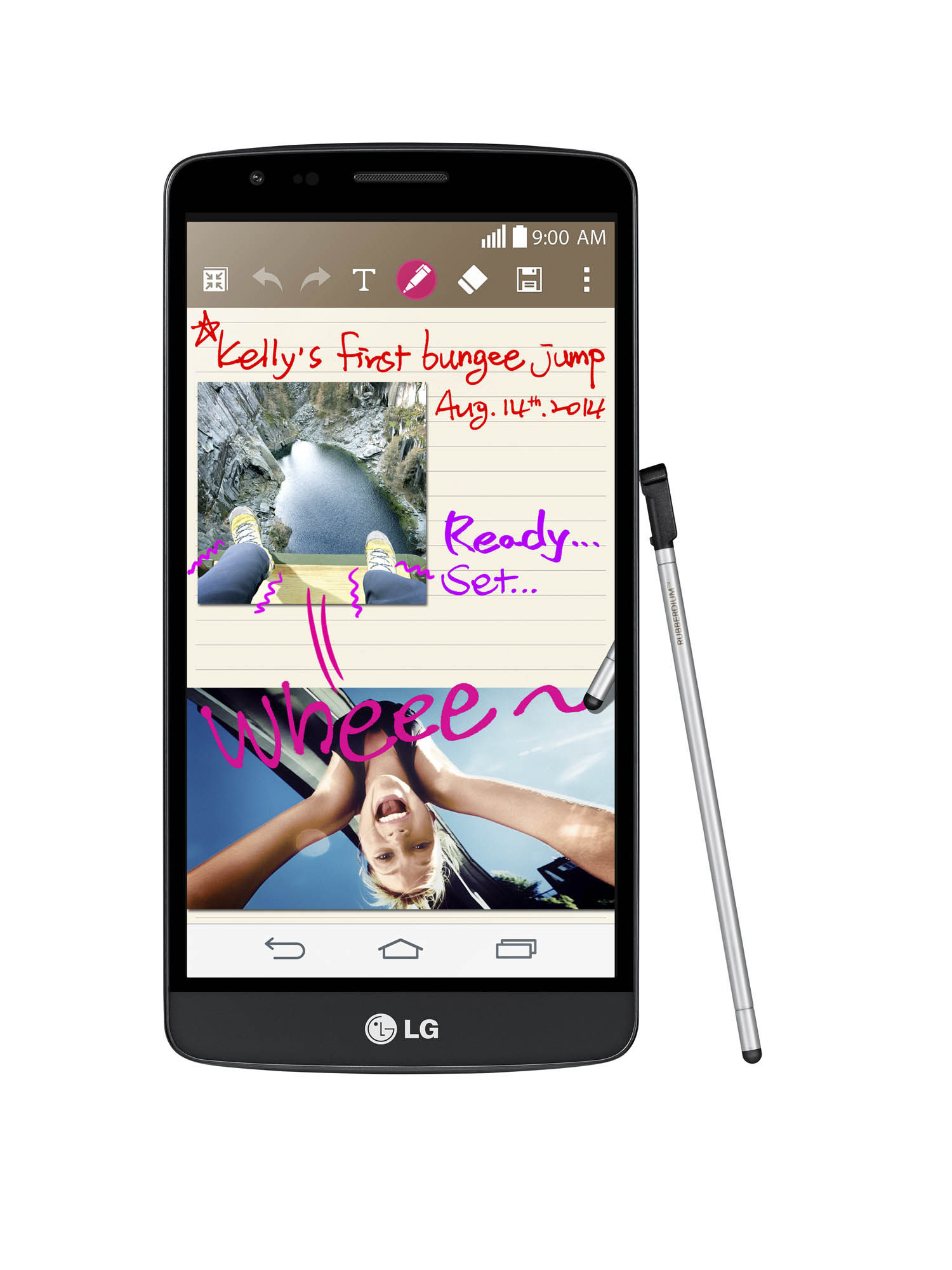 LG전자, ‘LG G3 스타일러스’ 출시로 ‘G3’ 패밀리 라인업 완성 ■ ‘G3’ 디자인에 스타일러스 펜 탑재해 성장국가 보급형 3G시장 정조준 □ 러버듐(Rubberdium) 스타일러스 펜 탑재로 편리한 메모 및 실행 □ 메탈릭 스킨 후면 커버, 후면키 등 ‘G3’ 디자인 그대로 계승 □ ‘Q메모플러스’, ‘셀피 카메라’, ‘스마트 키보드’ 등 혁신 UX 적용 ■ LG전자, ‘G3’, ‘G3비트’, ‘G비스타’, ‘G3 스타일러스’ 등 차례로 출시… 고급형부터 보급형에 이르는 ‘G3 시리즈’ 패밀리 라인업 완성 ※ Social LG전자 ( 에서 관련 보도자료를 확인하실 수 있습니다.